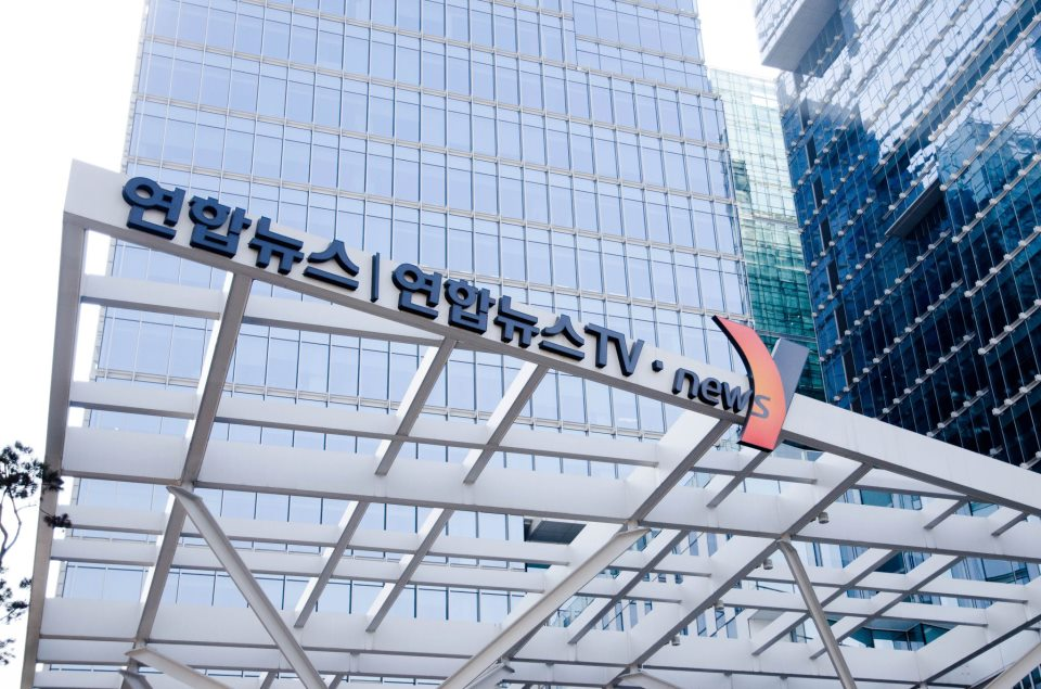 Yonhapnewstv